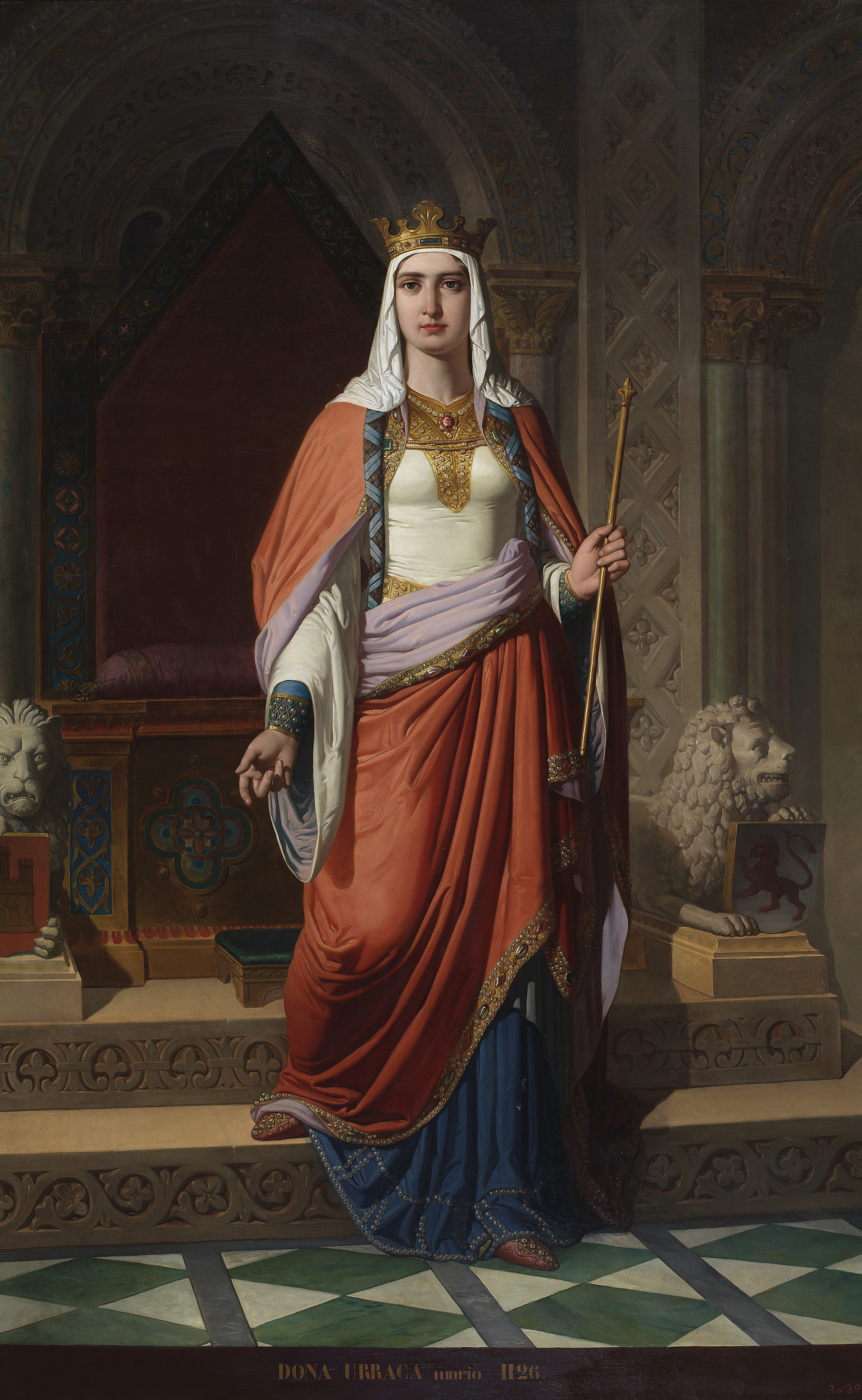 Retrato imaginario de la reina Urraca I de León (1081-1126). Fue hija del rey Alfonso VI de León y de la reina Constanza de Borgoña. Falleció en 1126, a los 44 años de edad y fue sucedida en el trono por su hijo, Alfonso VII de León.